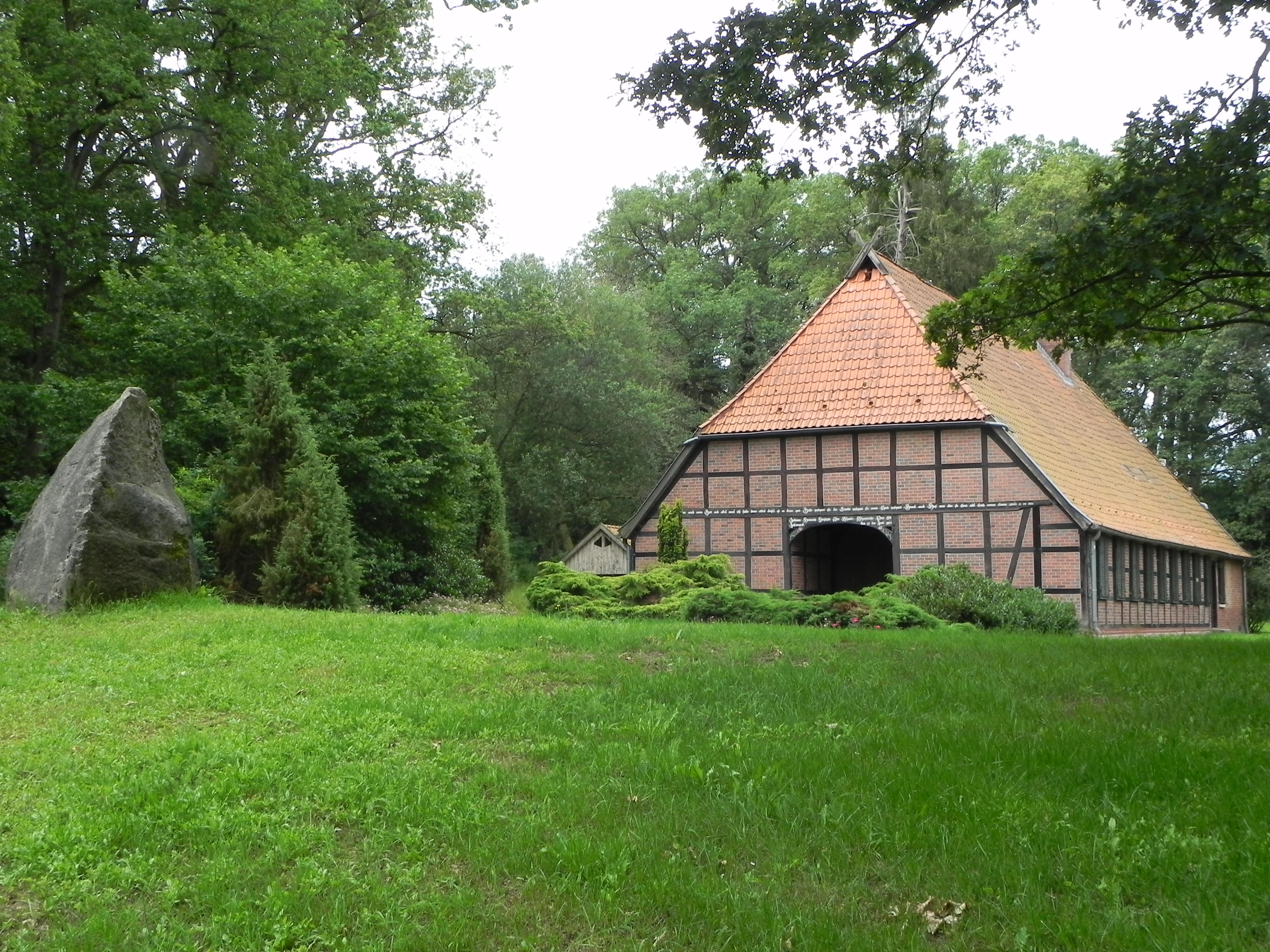 Ehemaliges Bauernhaus von 1844 in Lopau, Lüneburger Heide, Germany.